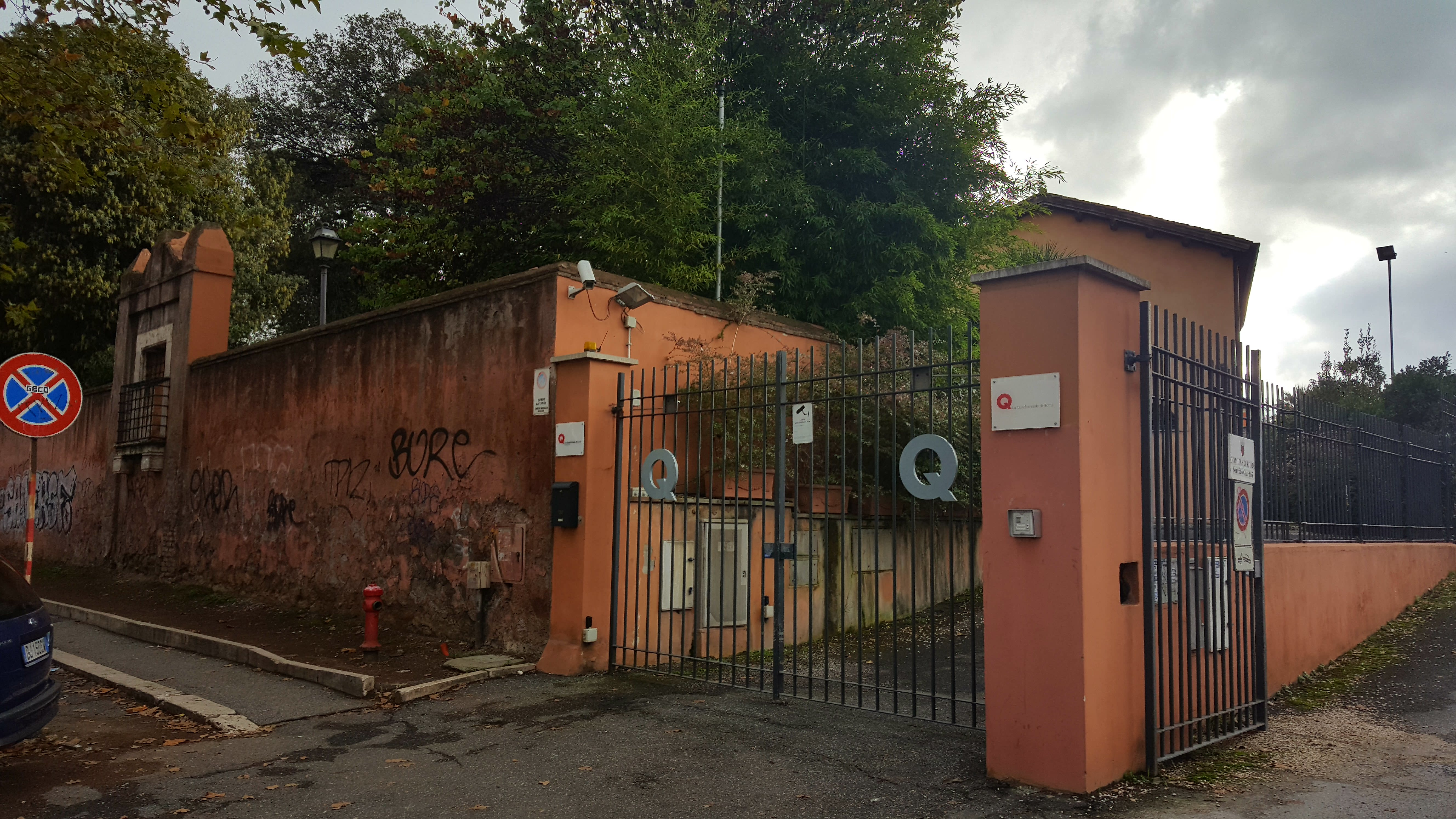 Sede della Quadriennale di Roma, a Villa Carpegna